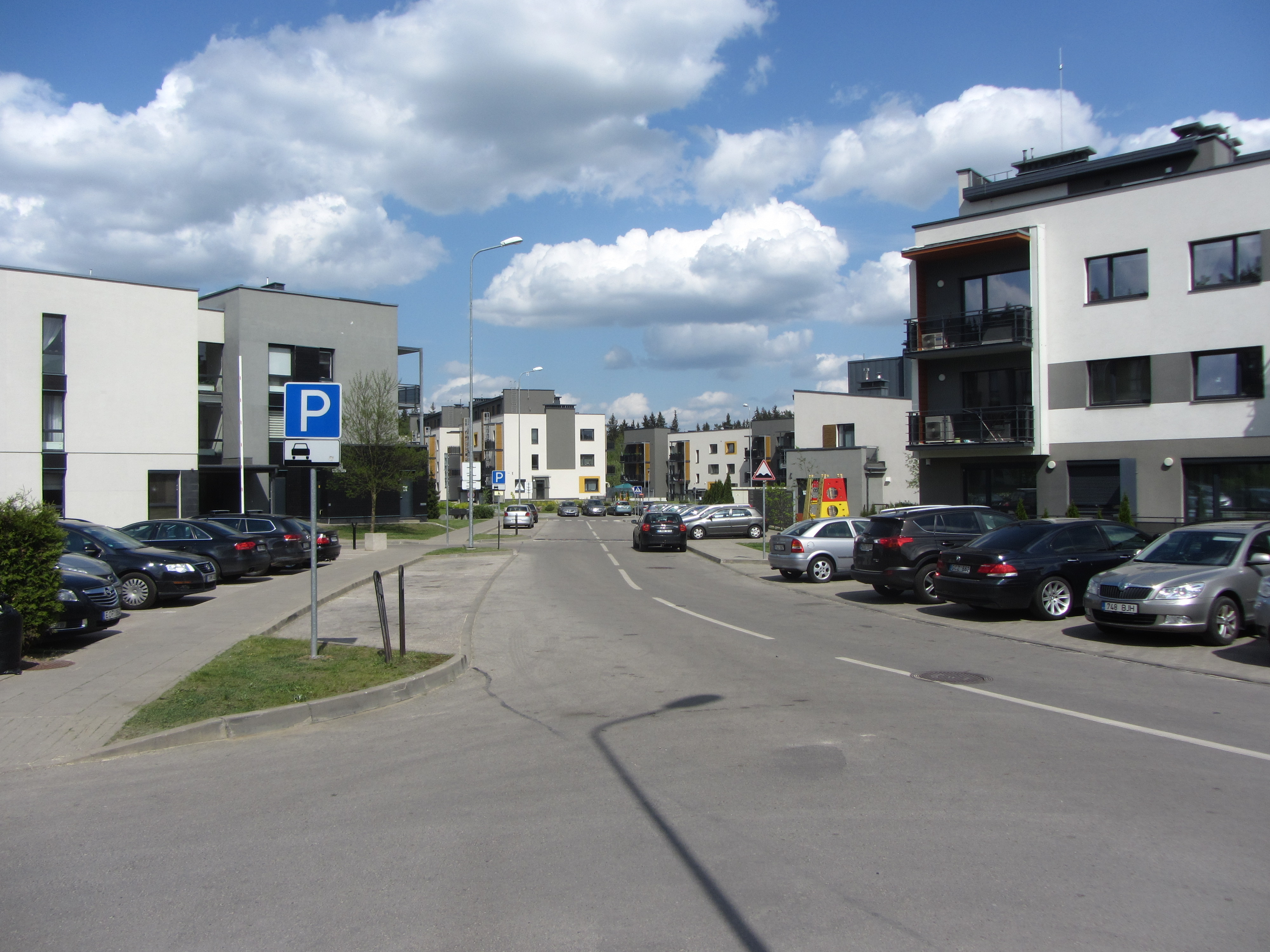 Vilnius, Lithuania